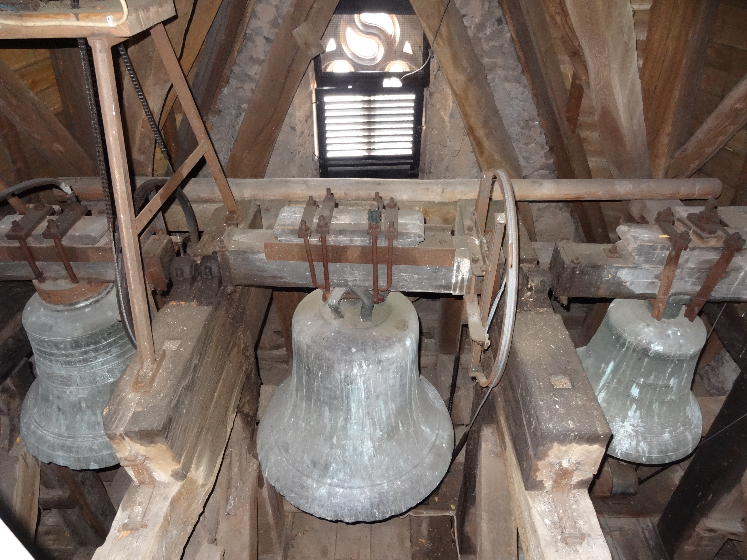 Evangelische Kirche Rodheim (Hungen)